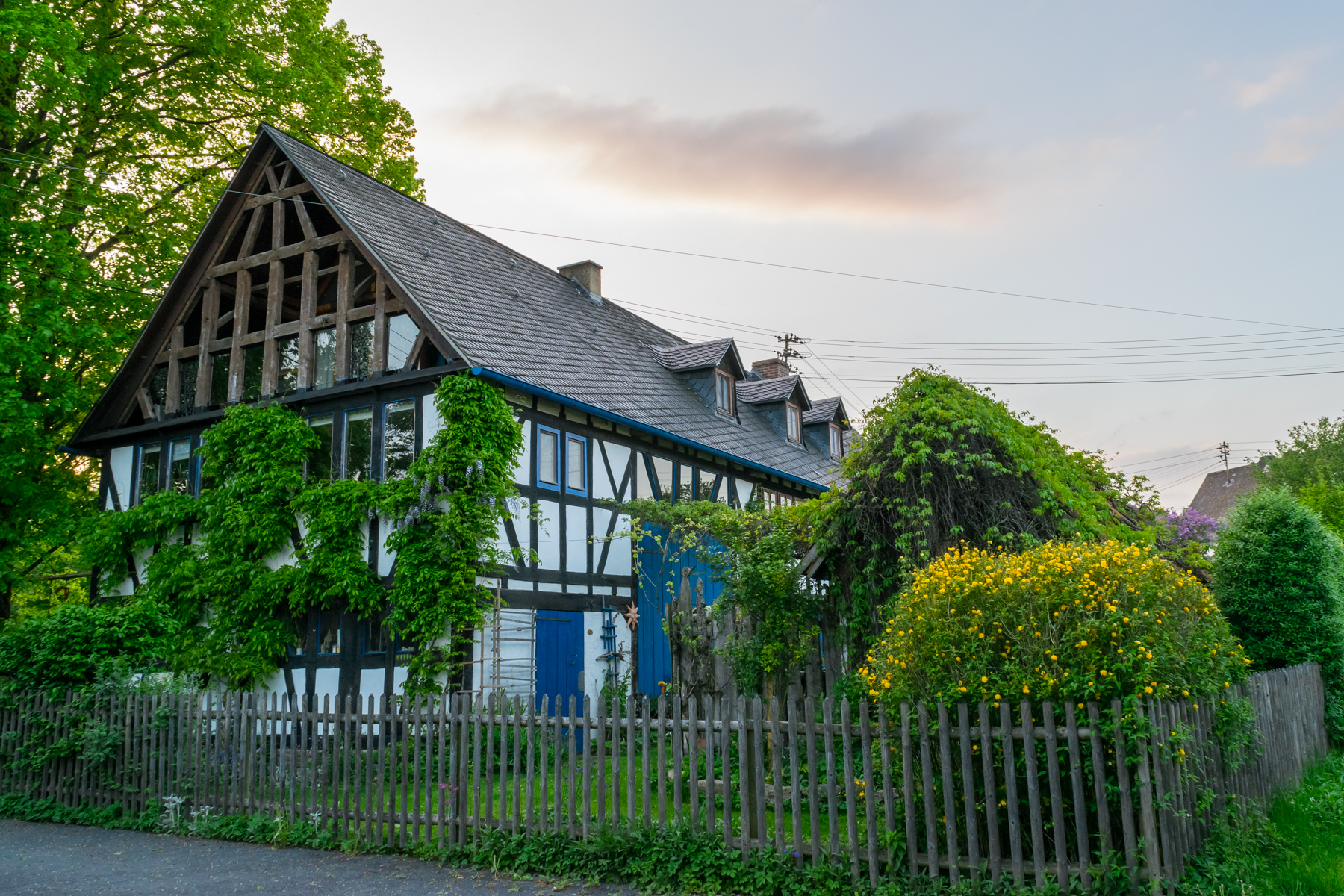 Fachwerkhaus